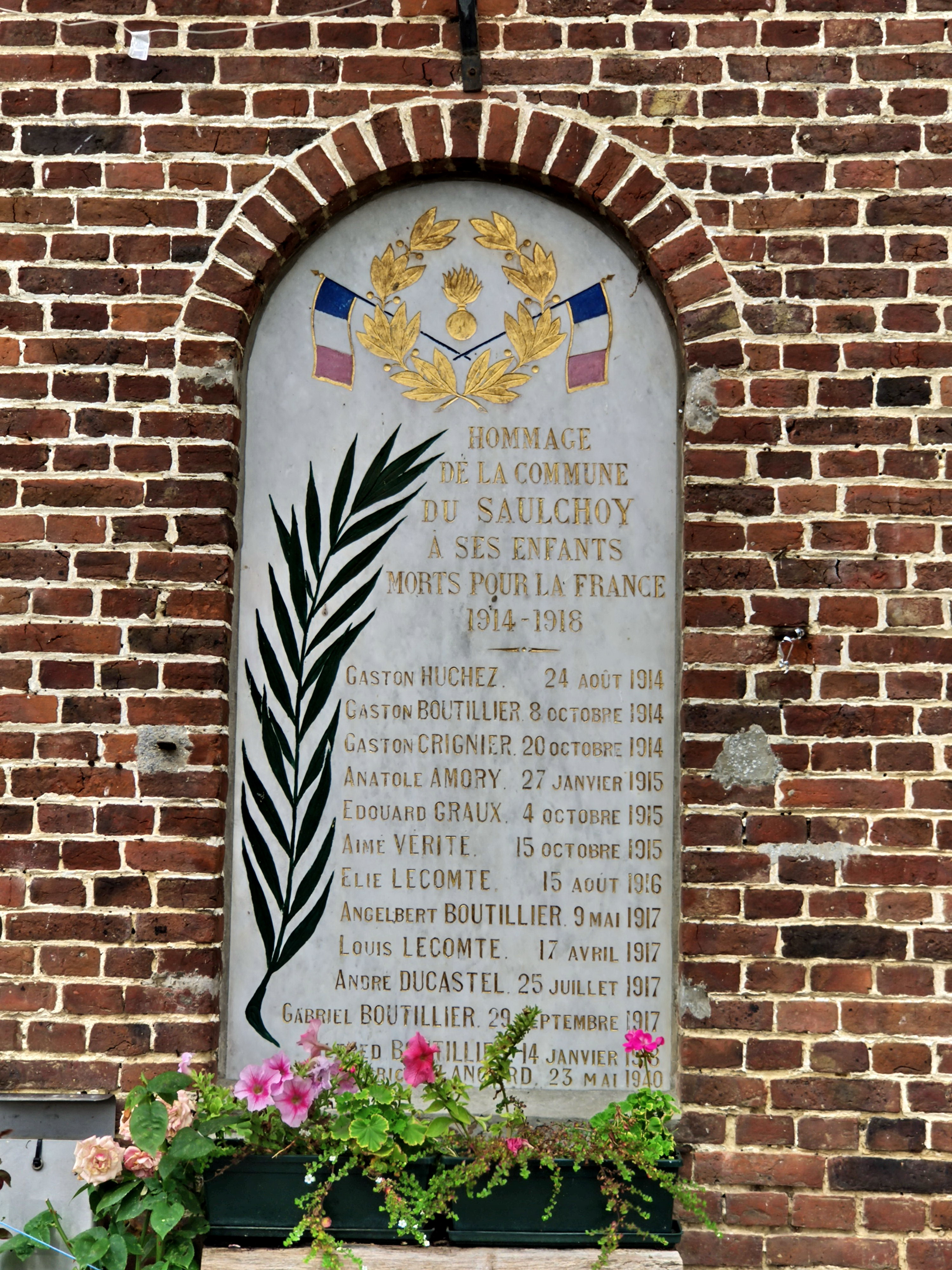 Le Saulchoy (60) : Plaque commémorative des Morts pour la France de la commune lors de la Première Guerre mondiale